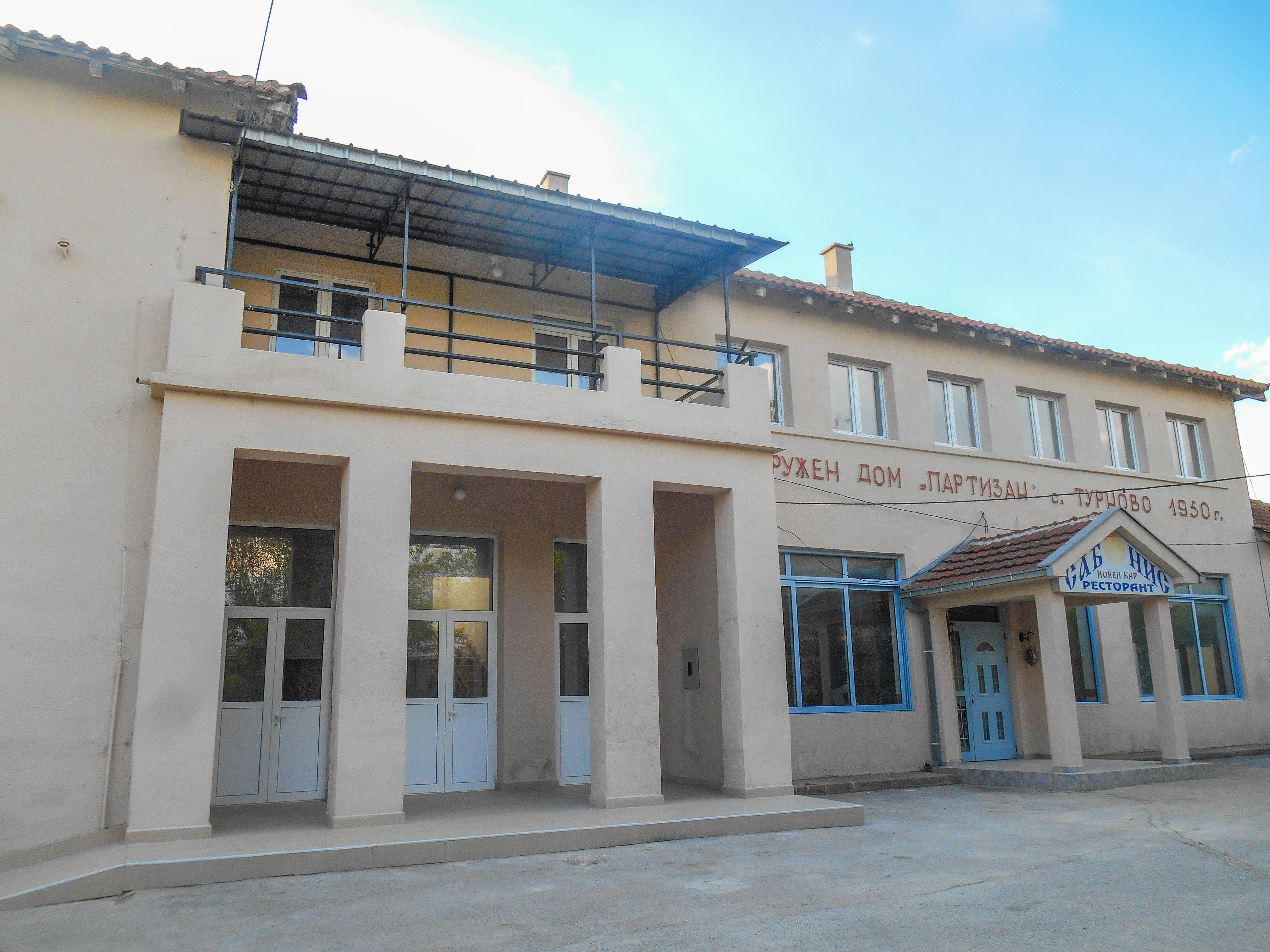 Дом на култура - Турново